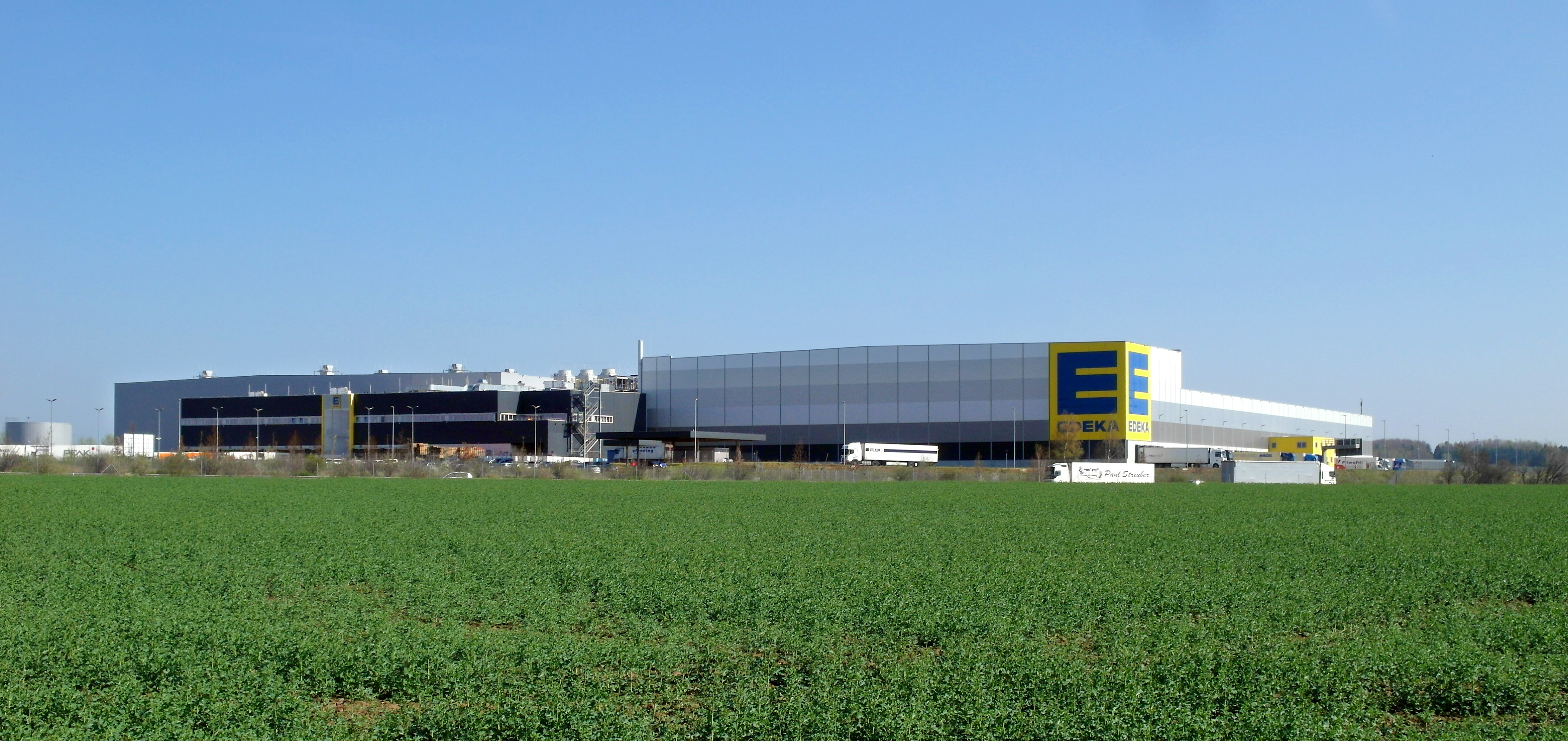 18.04.2018 09661 Berbersdorf (Striegistal), EDEKA-Straße (GMP: 51.003197,13.205309): Das von 2013 bis 2015 erbaute EDEKA-Zentrallager Sachsen in Berbersdorf. Sicht von Südwesten. [SAM5308.JPG]20180418100DR.JPG(c)Blobelt